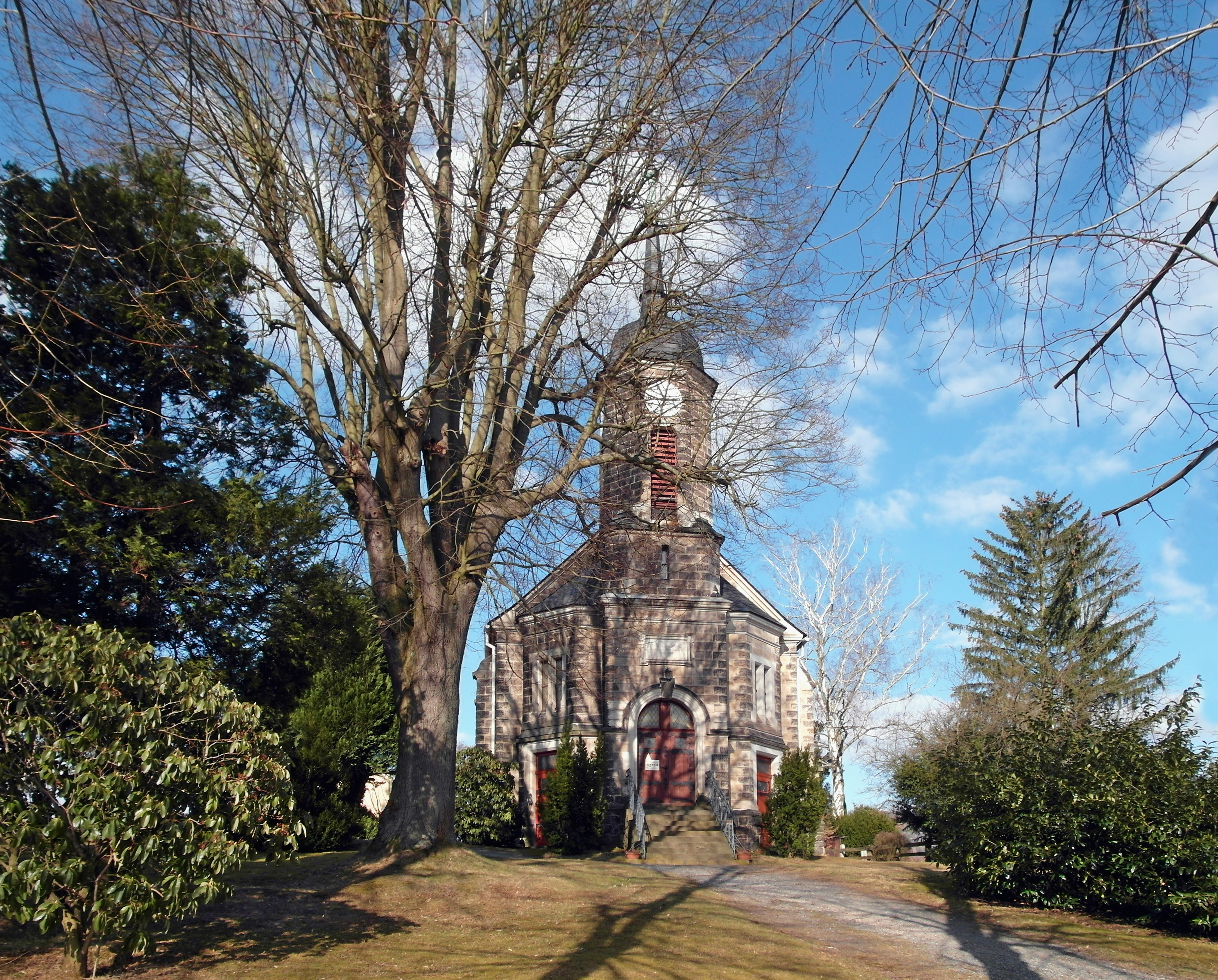 15.03.2018 01814 Porschdorf (Bad Schandau), Hauptstraße 59 (GMP: 50.917319,14.154427): Evangelische Dorfkirche, 1903 bis 1905 aus örtlichem Sandstein nach Plänen von Baumeister Quentin aus Pirna errichtet. Sicht von Süden. [SAM4674.JPG]20180315200DR.JPG(c)Blobelt